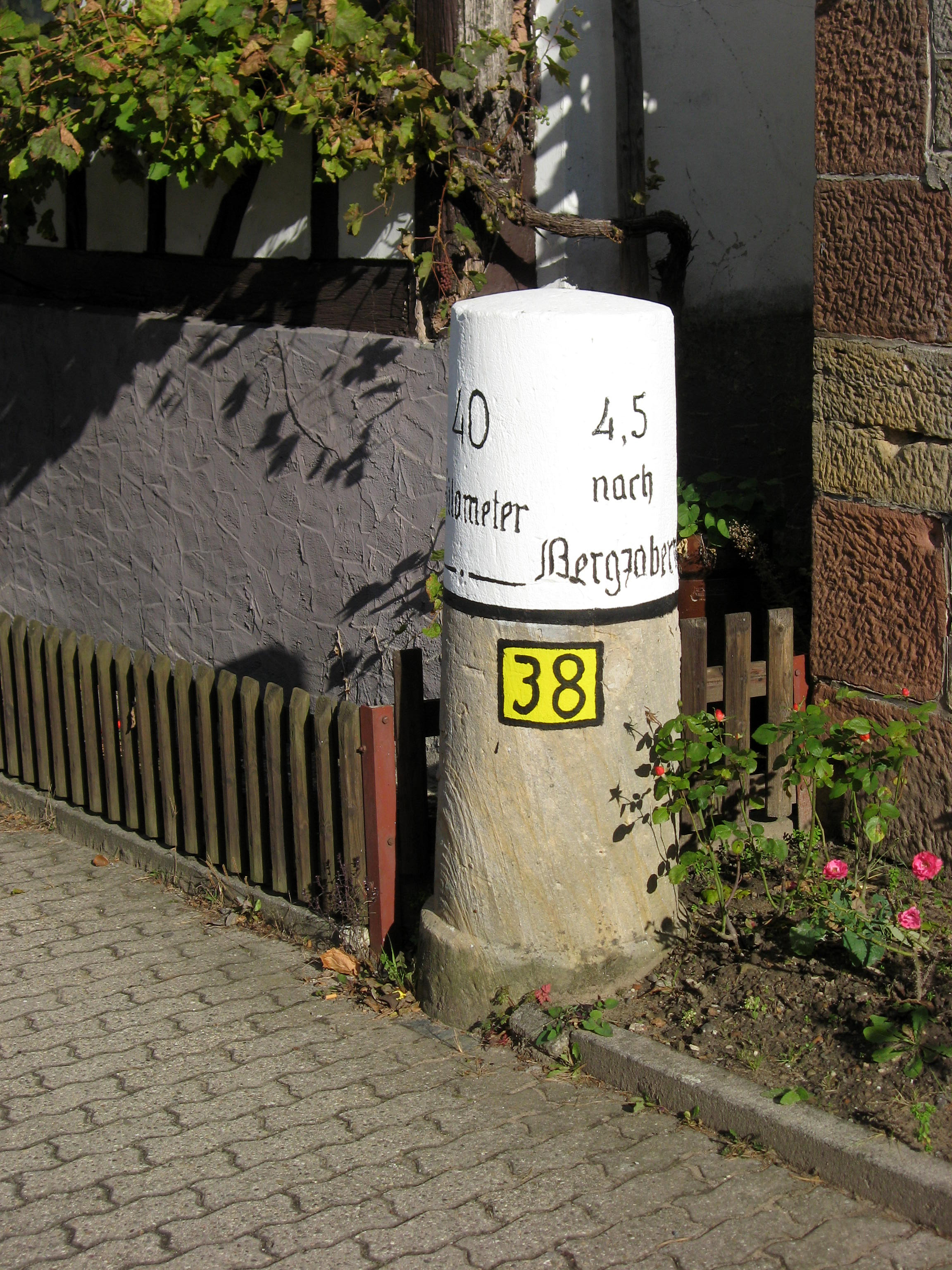 Kilometerstein bei Weinstraße Nr. 27 in Oberotterbach; bezeichnet 5,2 nach Weißenburg; 40 Kilometer; 4,5 nach Bergzabern